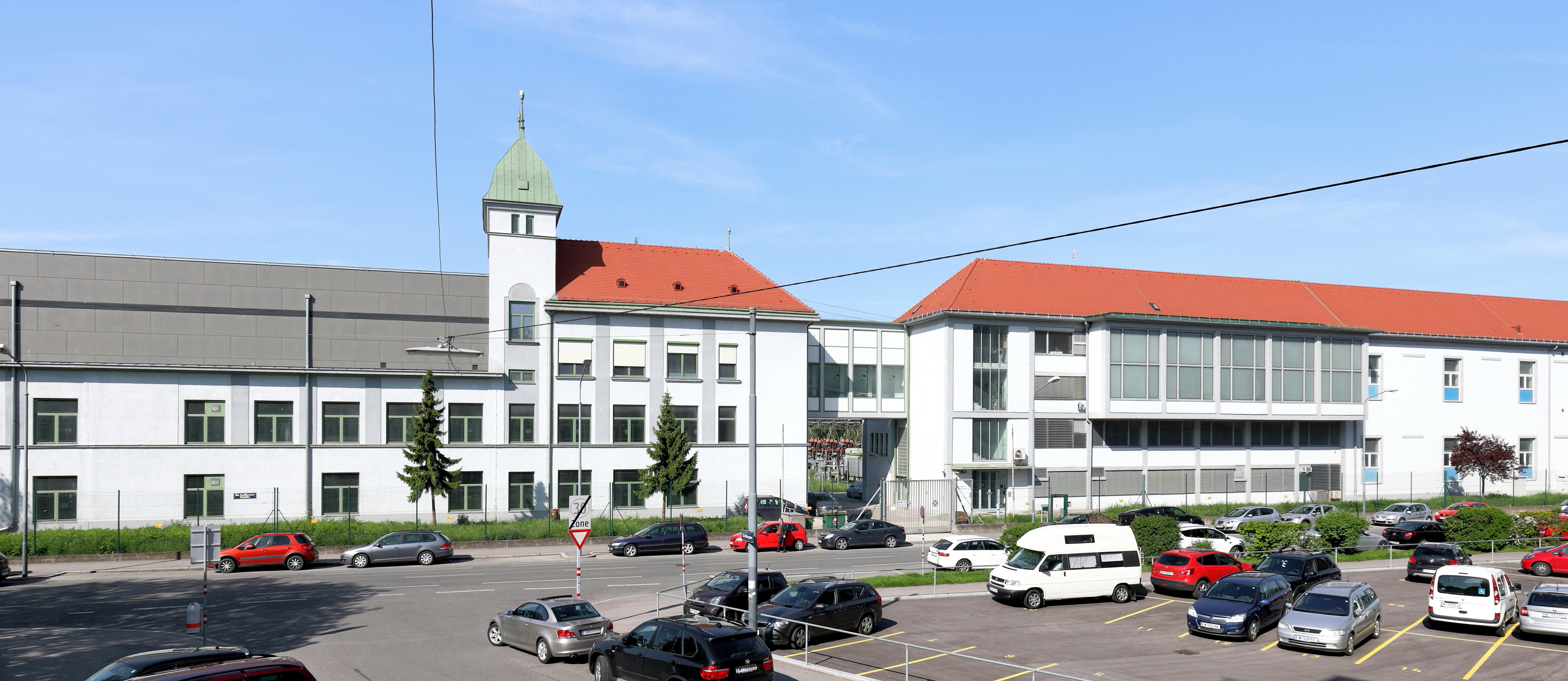 Das Umspannwerk Nord der Wien Energie an der Jedleseer Straße im 21. Wiener Gemeindebezirk Floridsdorf.Das linke Gebäude ist wohl in den 1920er Jahren errichtet worden und das rechte in den 1950er Jahren (?). Seit 2006 hat es eine 400kV-Schaltanlage mit 2 Transformatoren, die von 400kV auf 110kV transformieren und die vom Umspannwerk Bisamberg gespeist werden. Weiters hat es eine 110kV-Schaltanlage mit 3 Transformatoren, die von 110 kV auf 10 kV transformieren. Mit diesen 10 kV werden Netzstationen gespeist, die wiederum rd. 50.000 Haushalte in Floridsdorf und der Donaustadt versorgen (Stand 2017).